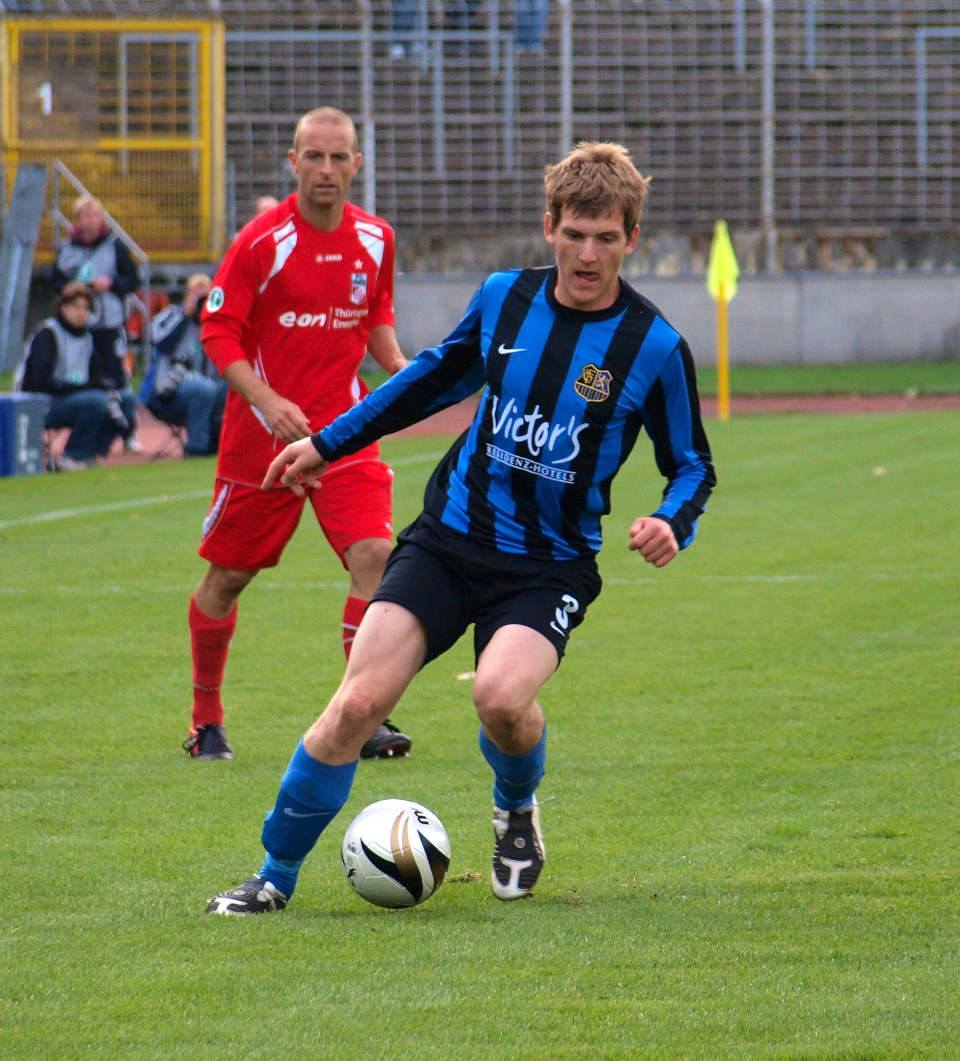 Lukas Kohler (Bildvordergrund) im Oktober 2010